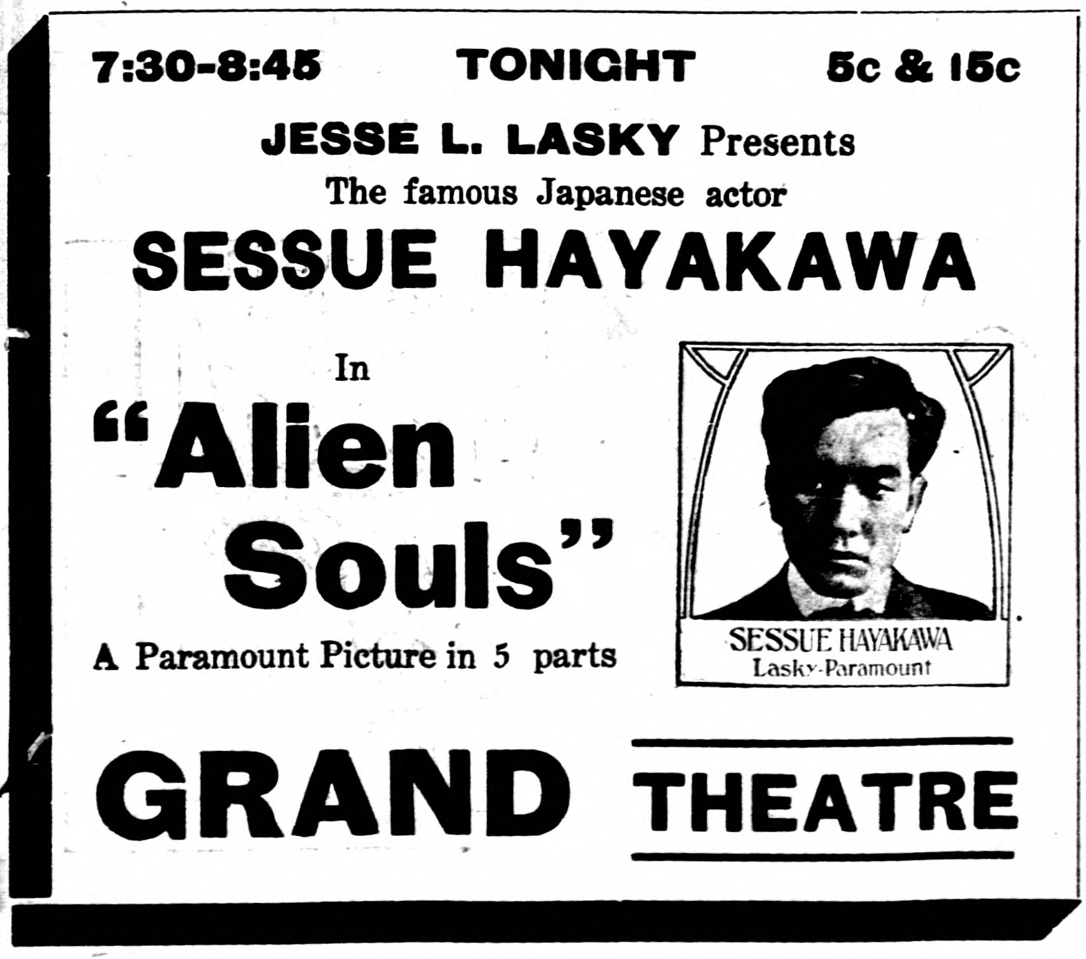 Alien Souls advertisement